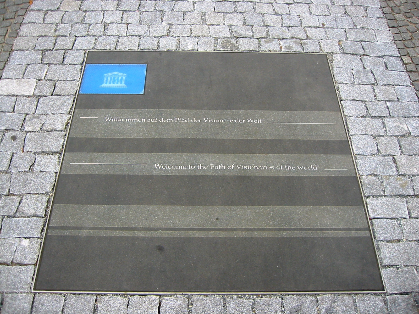 Hinweisschild auf den Unseco Pfad der Visionäre der Welt auf der Friedrichstraße (Fußgängerzone) nahe dem Mehringplatz in Berlin-Kreuzberg